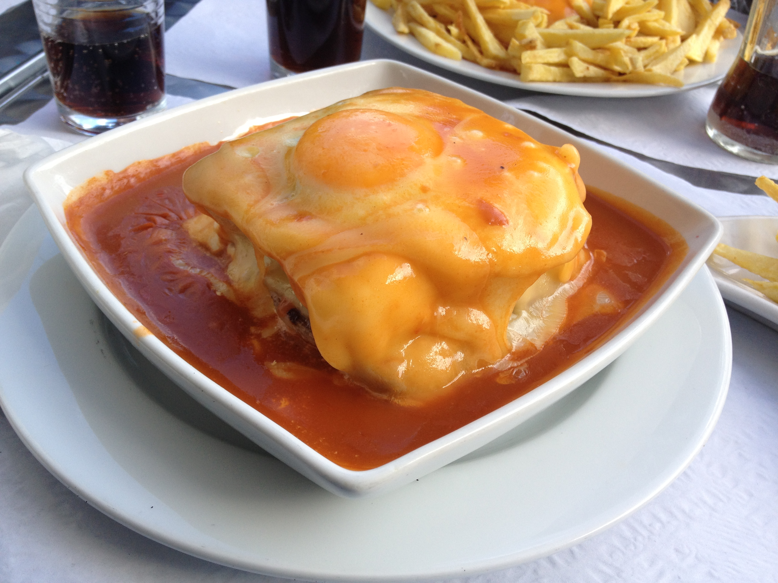 Francesinha especial